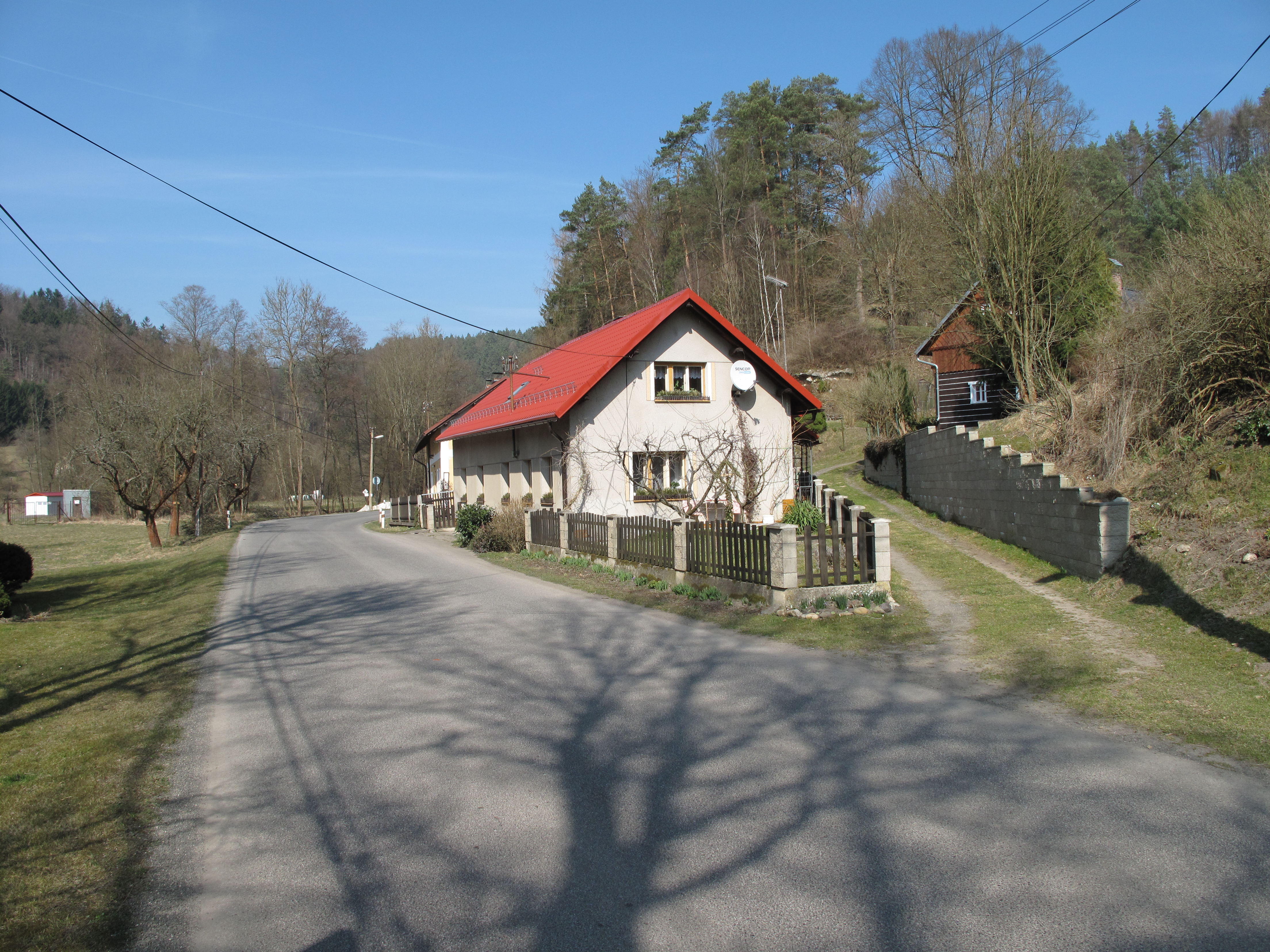 Dům v Podjestřábí. Okres Liberec, Česká republika.